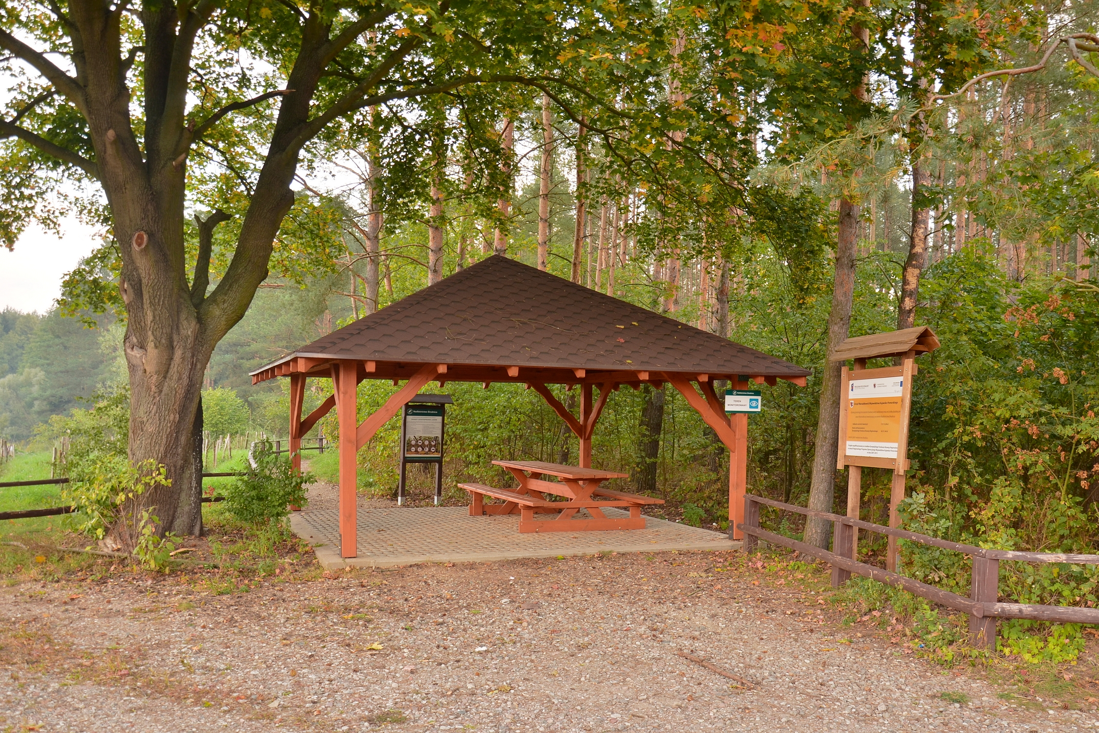 Ścieżka dydaktyczna przez Bagienną Dolinę Drwęcy, wiata